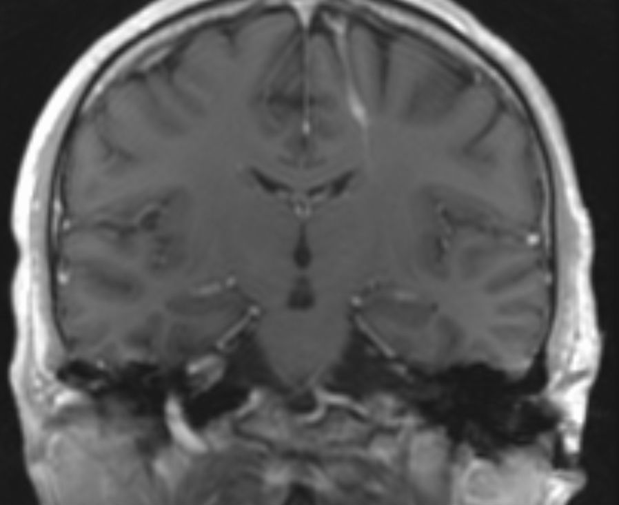 Developmental Venous Anomaly in der Magnetresonanztomographie T1KM coronar.